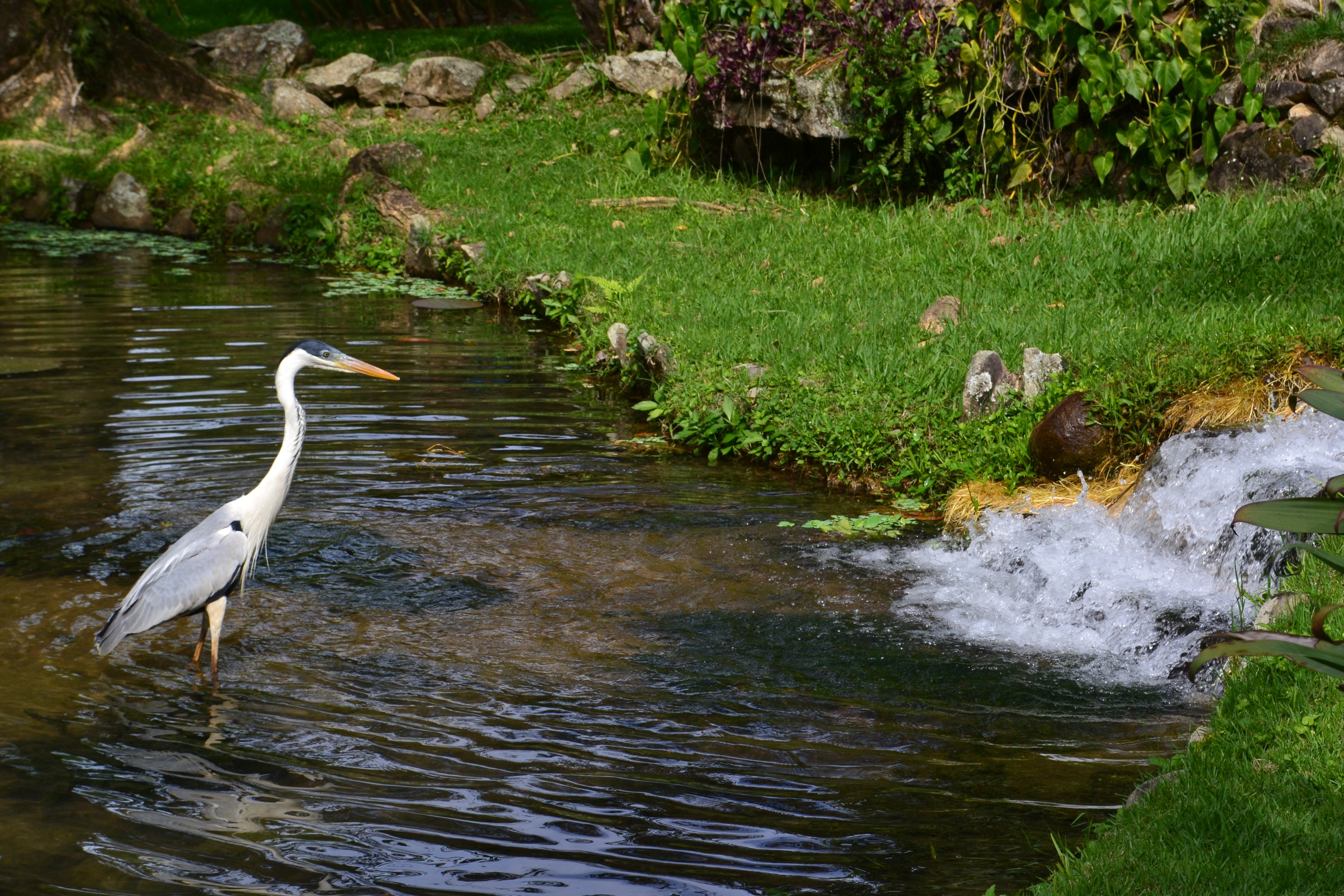 Garça Moura, Ardea cocoi Linnaeus, 1766, caçando no Lago Frei Leandro, lago da vitória régia, Jardim Botânico, Rio de Janeiro, RJ, Brasil